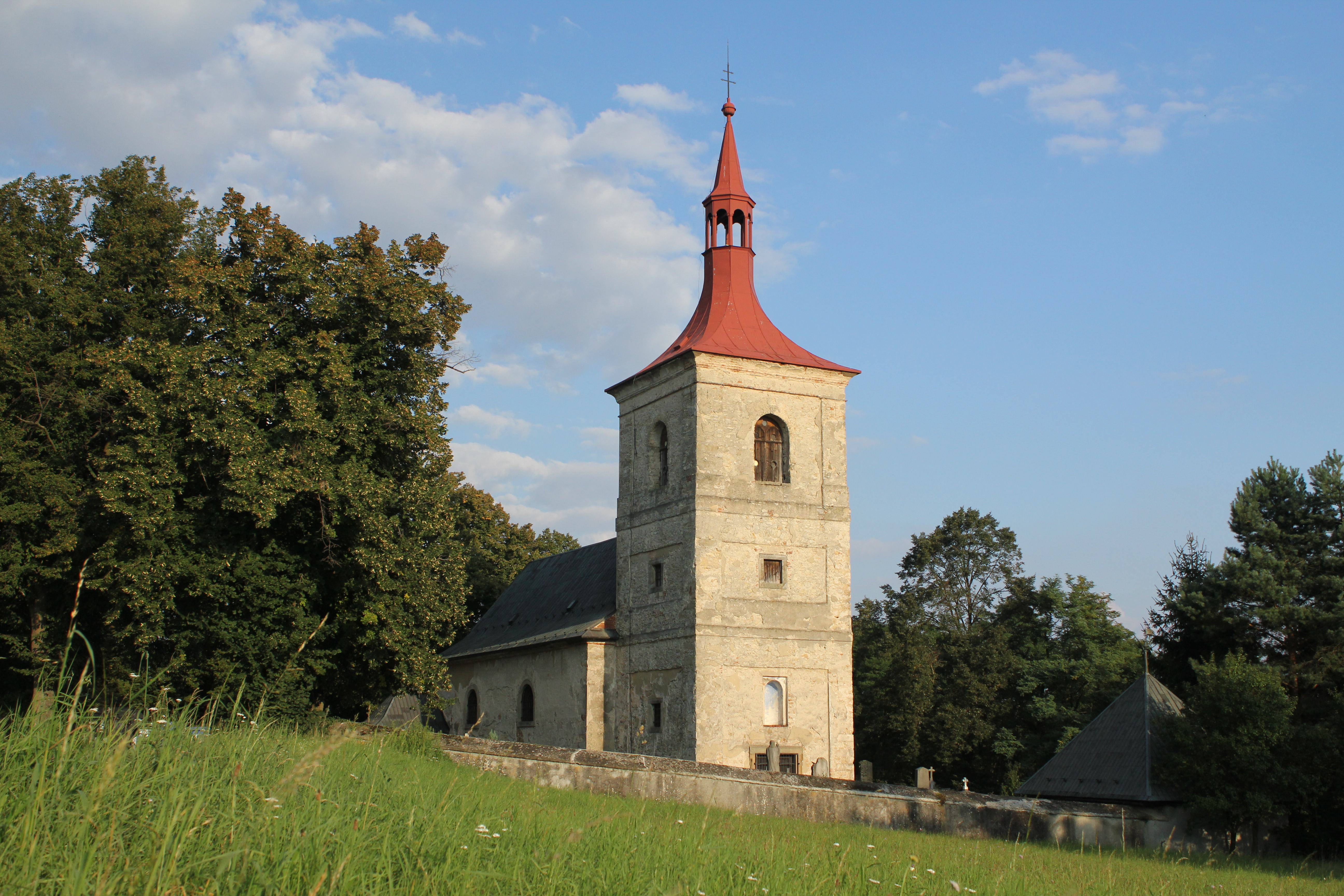 Kostel svatého Jakuba Staršího, Letařovice